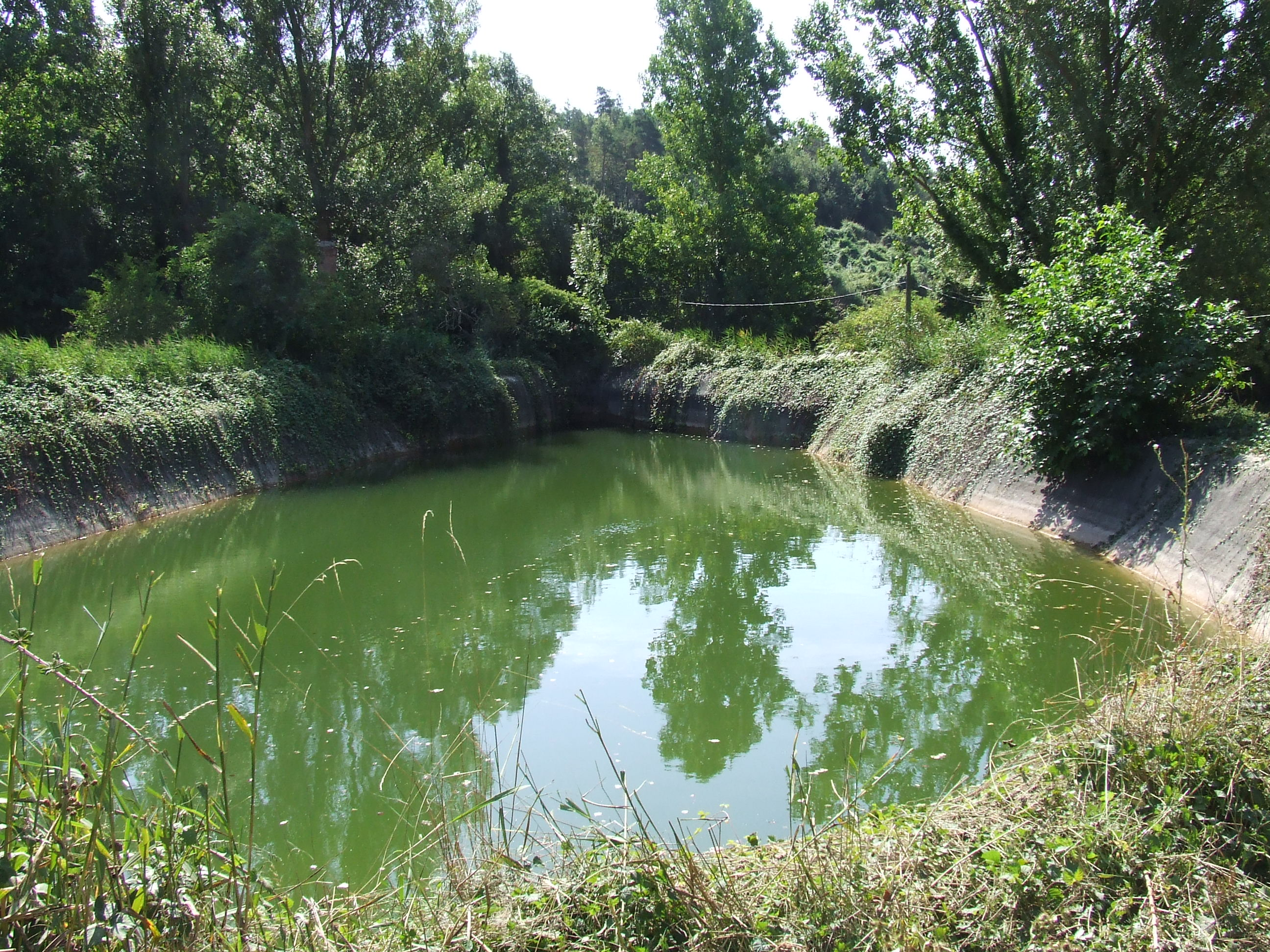 La Bassa del Molí del Bosc (Castellcir, Moianès)